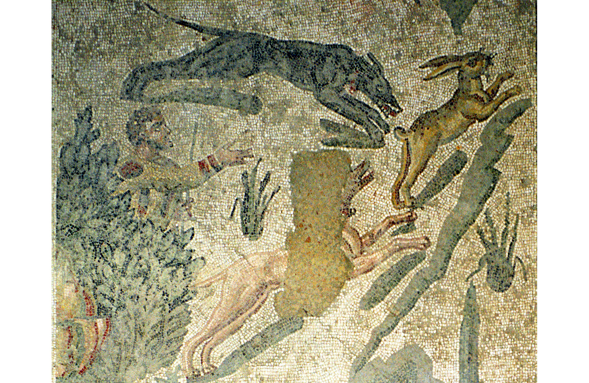 Sicily, Villa Romana del Casale